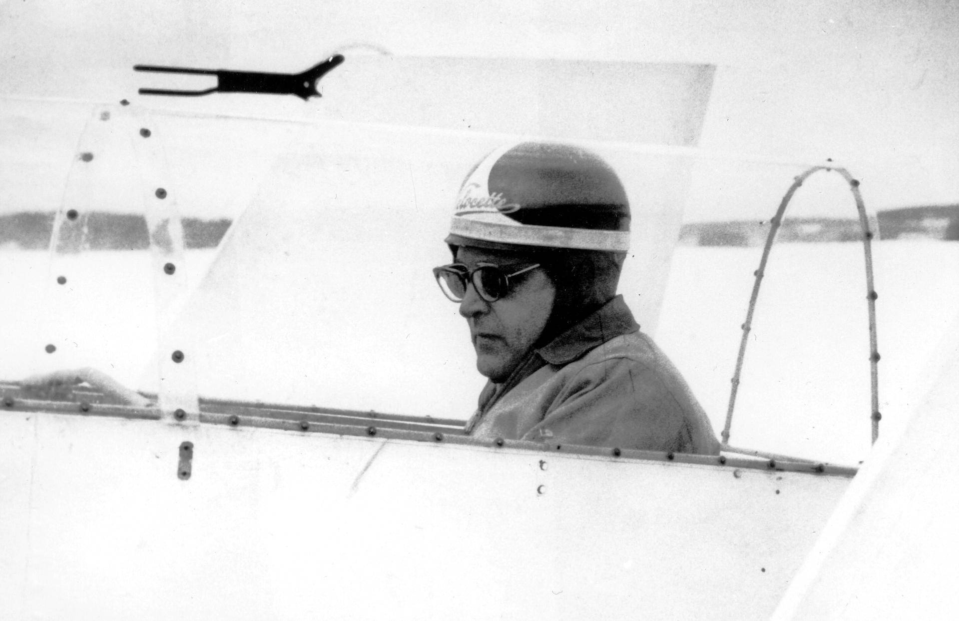 Keksijä, diplomi-insinööri Toivo Kaario (1912–1970) Pintaliitäjä 8:n ohjaamossa.